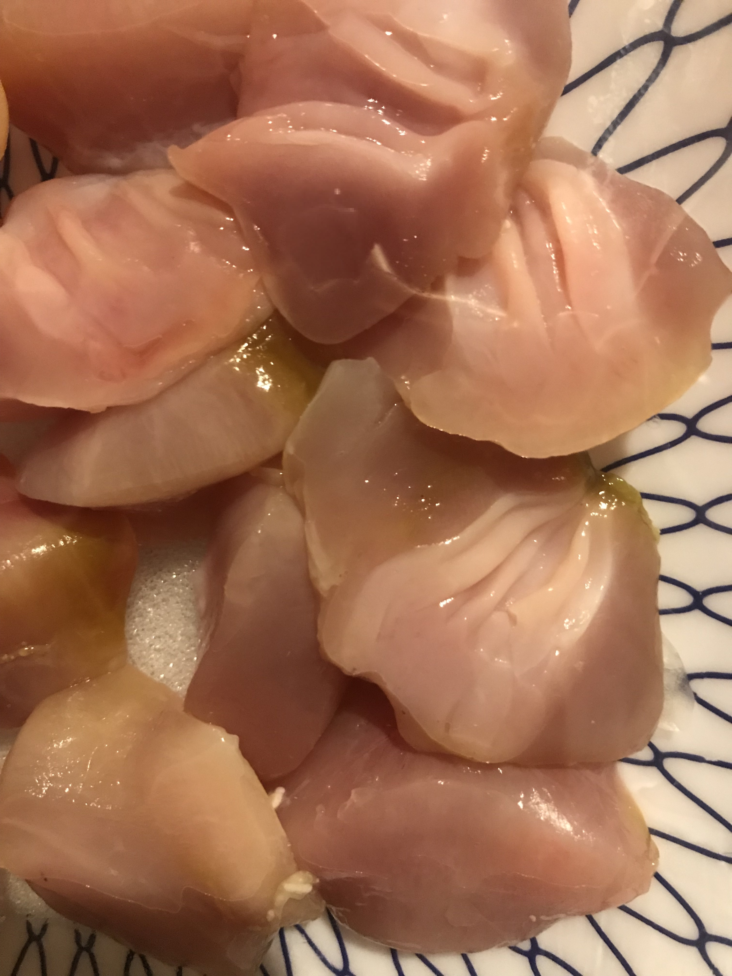 未調理のボラのへそ